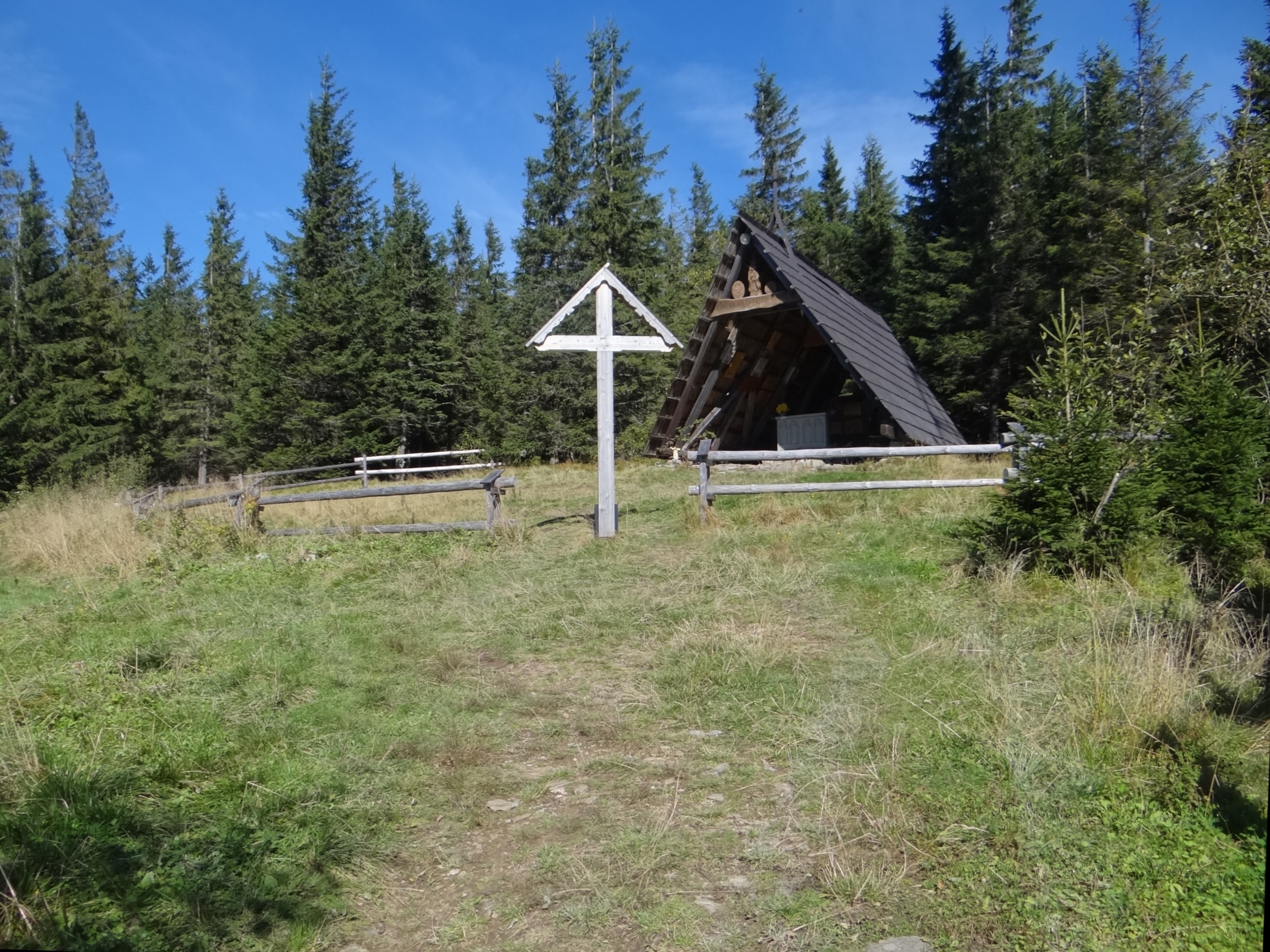 Kaplica M. B. Opiekunki Turystów na Okrąglicy